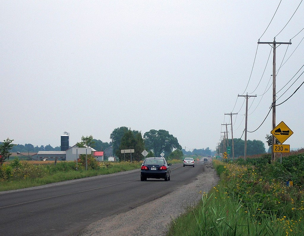 Vue sur la route 348, dans la ville de Rawdon, Québec, Canada.